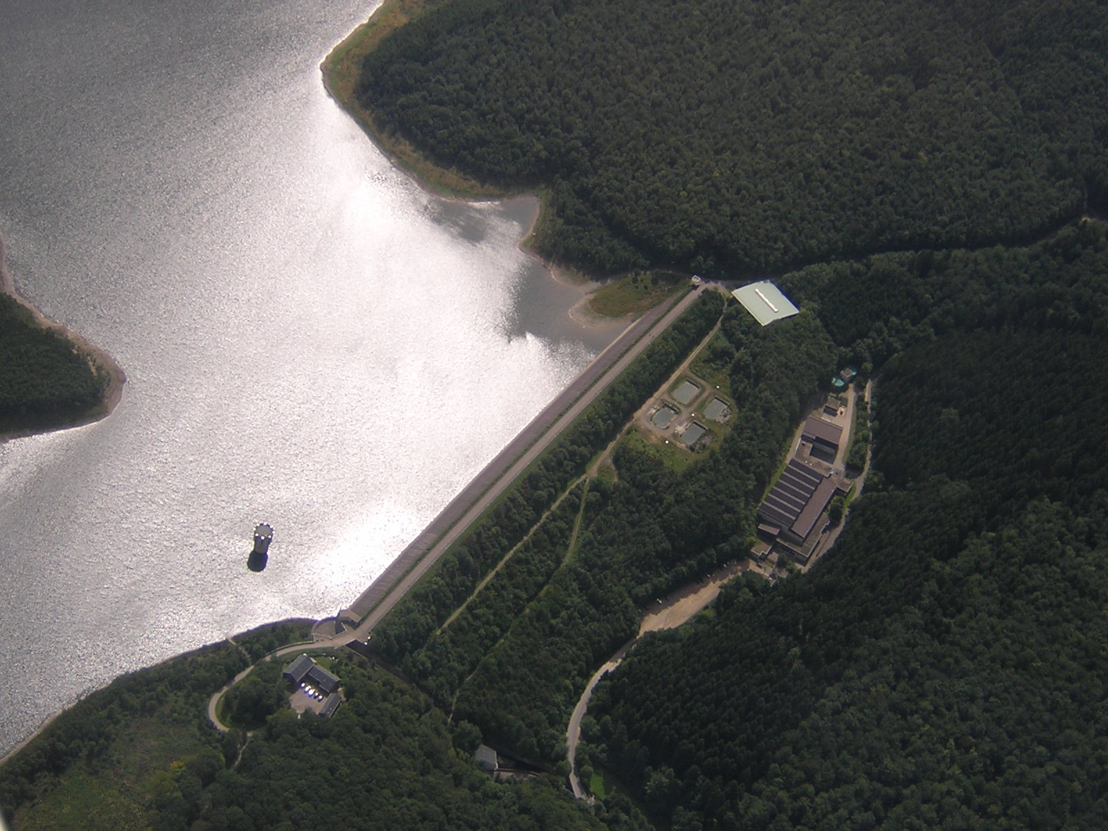 Wehebachtalsperre